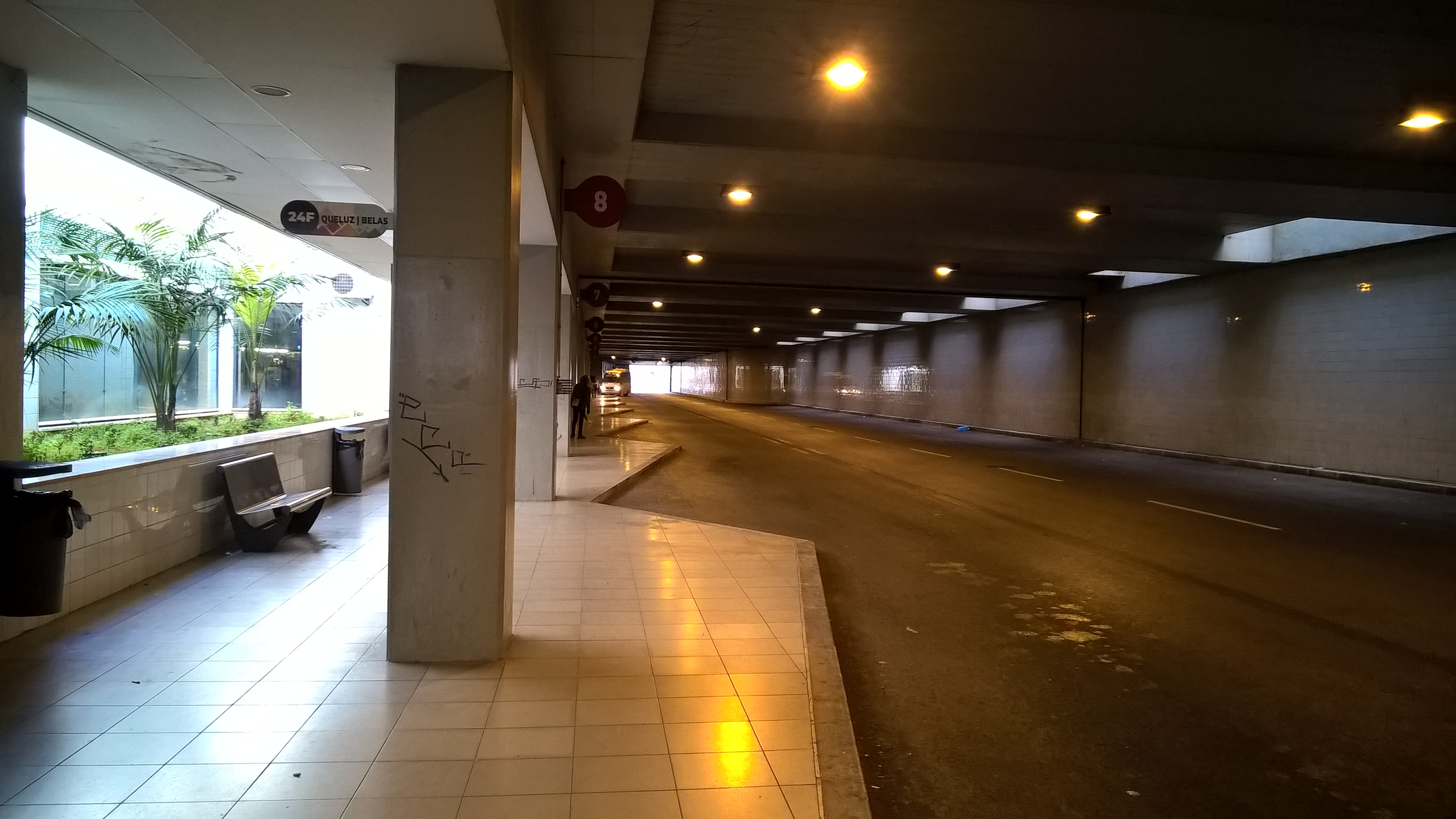 Agualva-Cacém - estação ferroviária - Terminal rodoviário